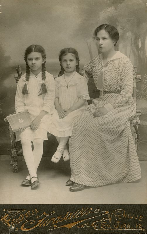 Marija Šlapelienė with daughters Laimutė (left) and Gražutė